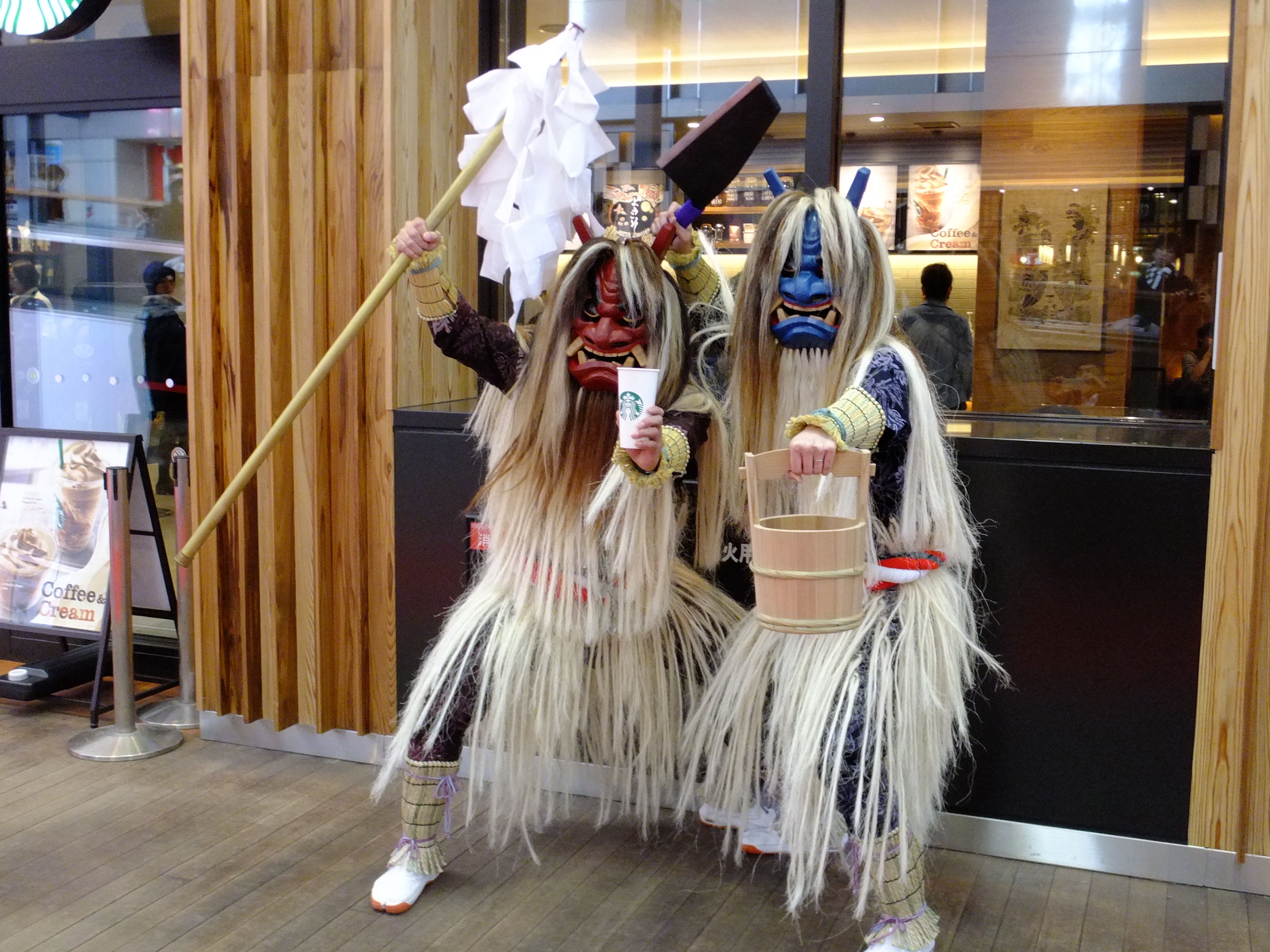 スターバックス秋田駅店のオープニングセレモニーにはナマハゲが登場した。